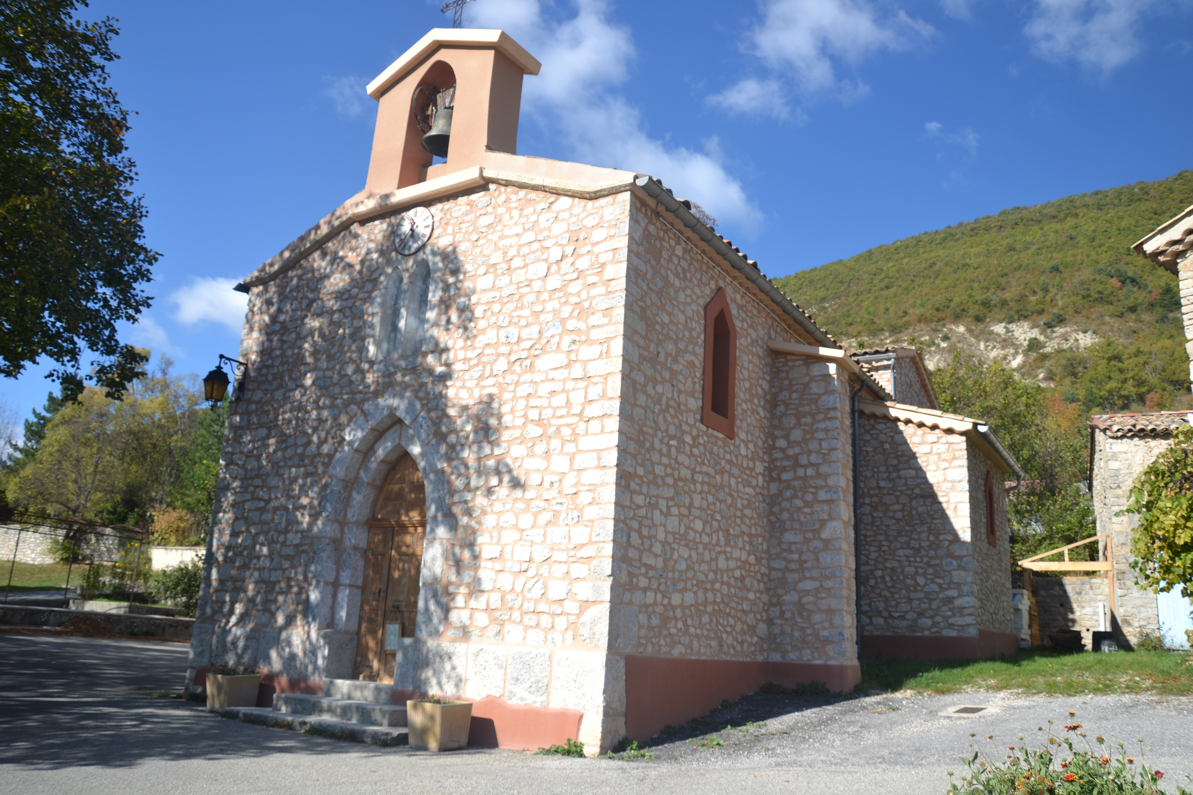 église de Ballons